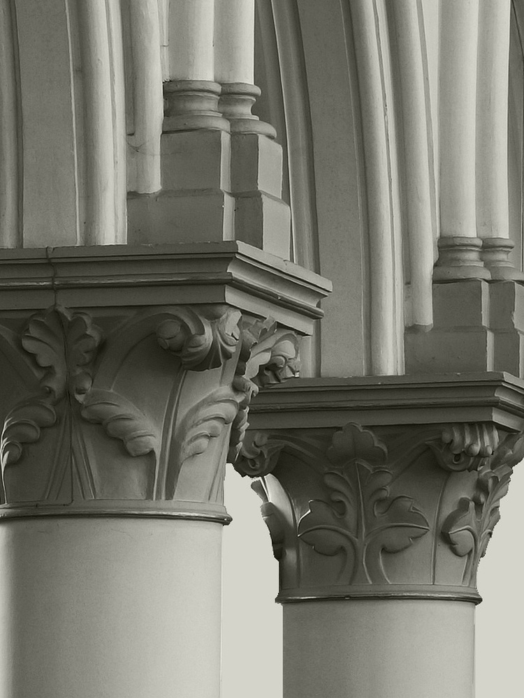 Sint-Willibrorduskerk (Merksplas) - Interieur - Kapitelen van de pilaren (bewerkt fotomateriaal)